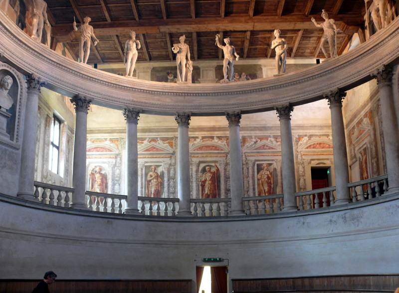 Teatro Olimpico di Sabbioneta - galleria o pergula